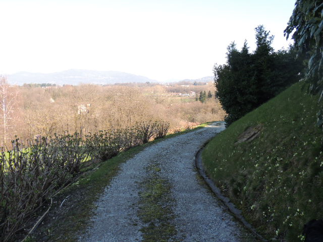 primo anello intorno alla villa carcano